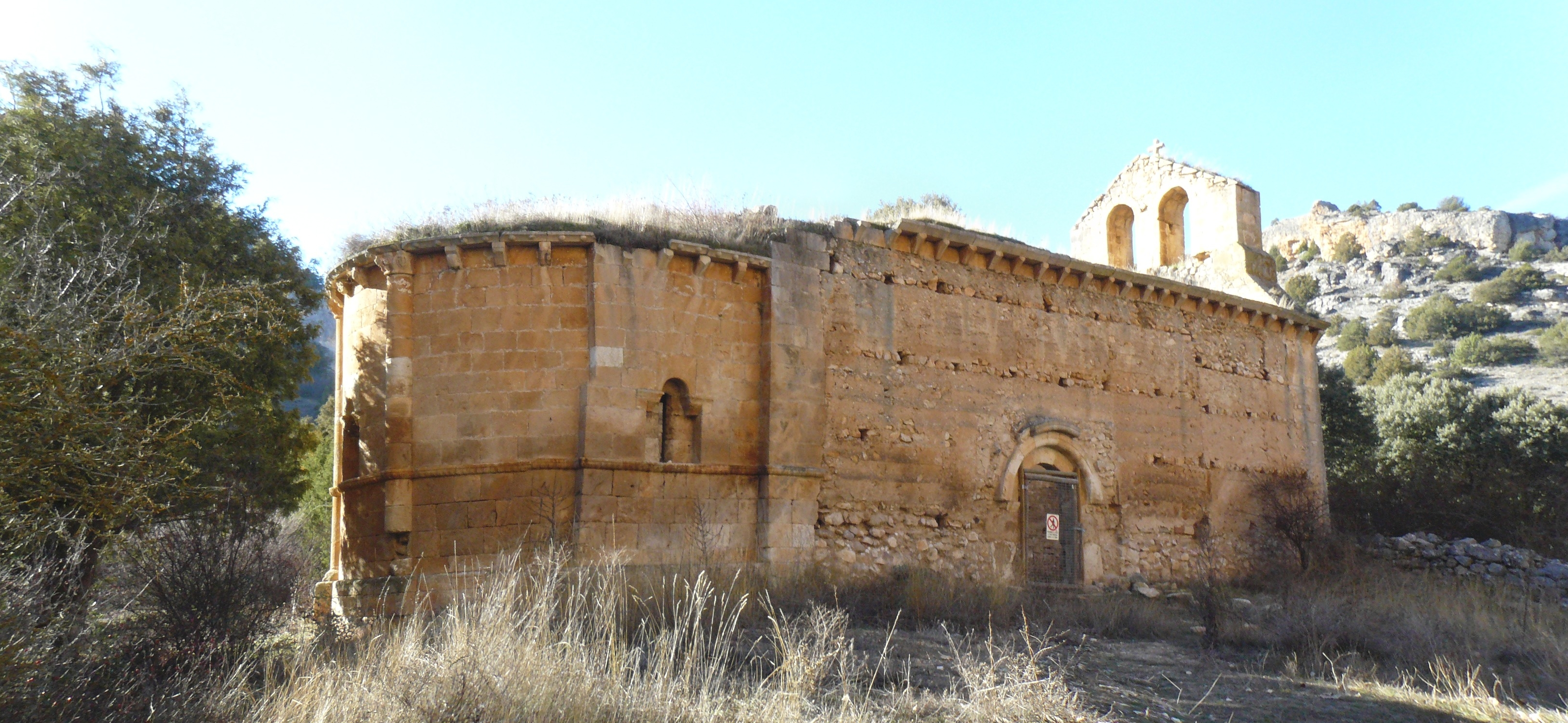 Imagen de la iglesia románica de San Martín del Casuar, en ruinas, en el municipio de Montejo de la Vega de la Serrezuela (Segovia).